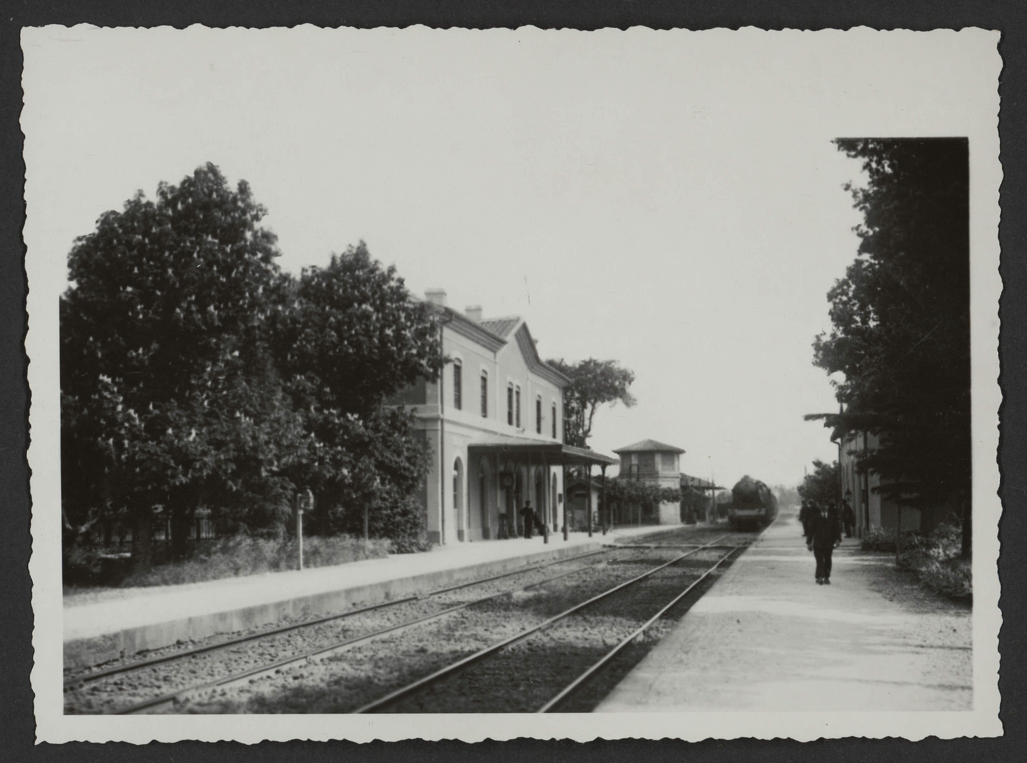 Gare de Donzère, département de la Drôme, France.